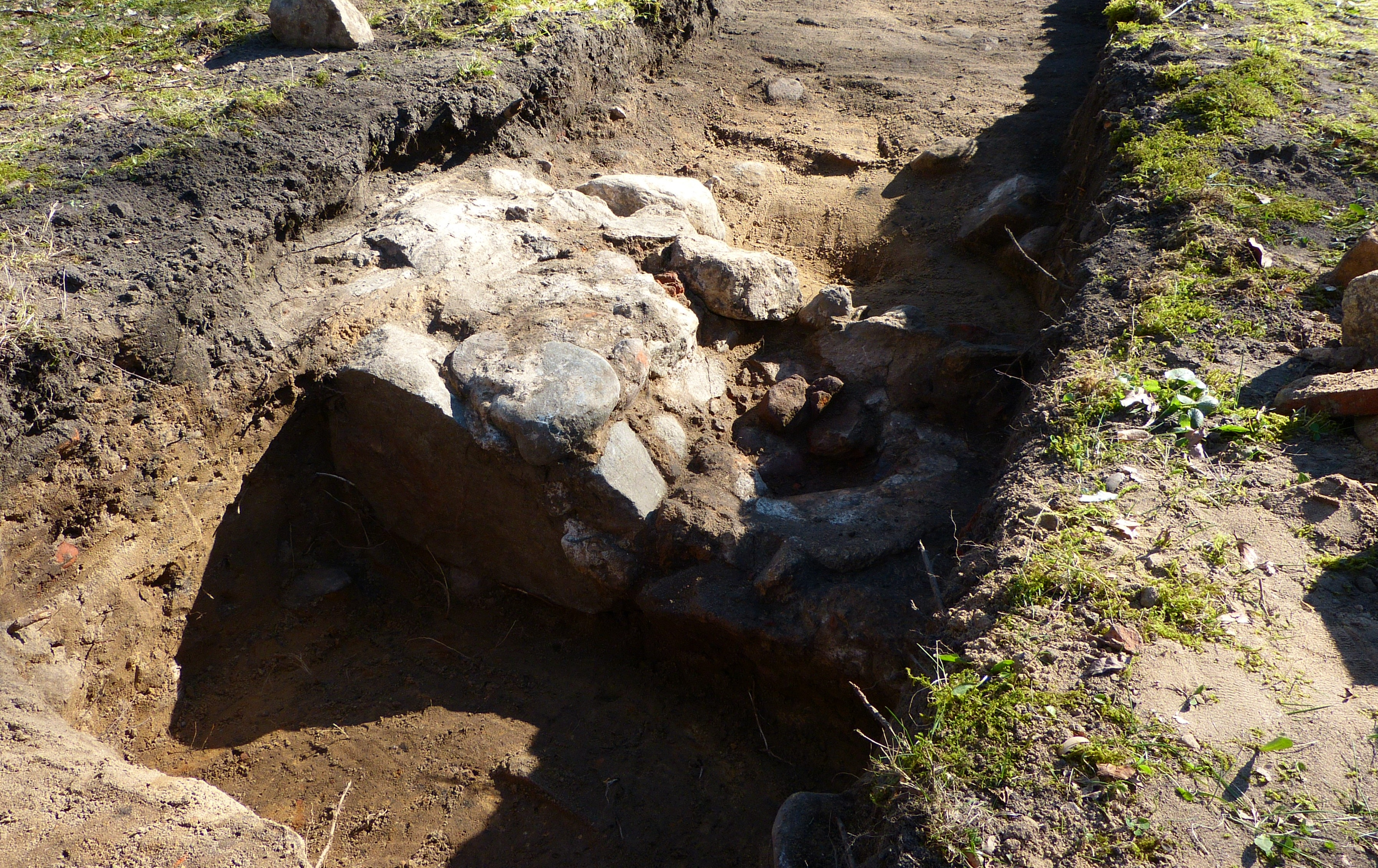 Fundamentrest (Westseite) der St.Georg-Kapelle während der Archäologischen Betrachtung.